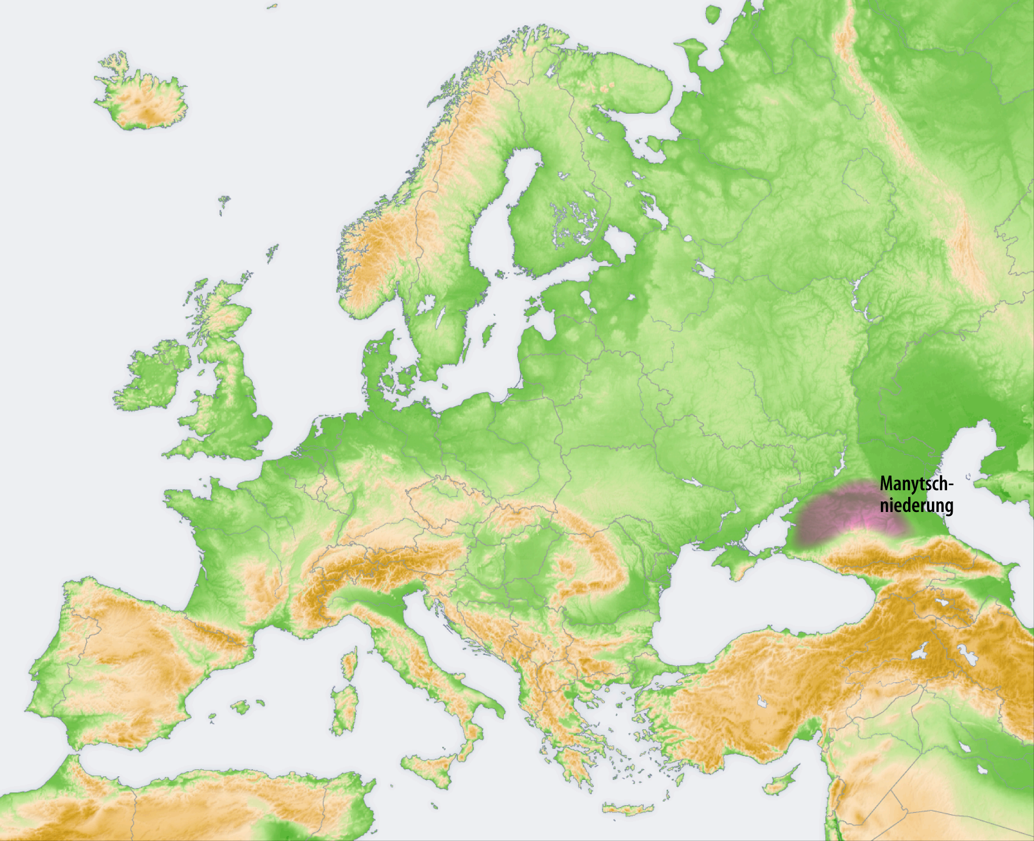 Landschaften der Osteuropäischen Ebene: Manytschniederung